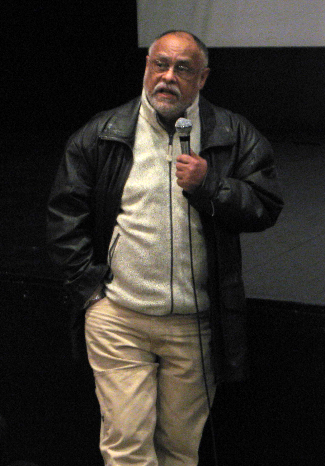 Hailé Gerima, à Amiens (Somme, France) - De passage à la "Maison de la Culture" pour présenter un de ses films lors du « 28ème Festival international du film d'Amiens ». .